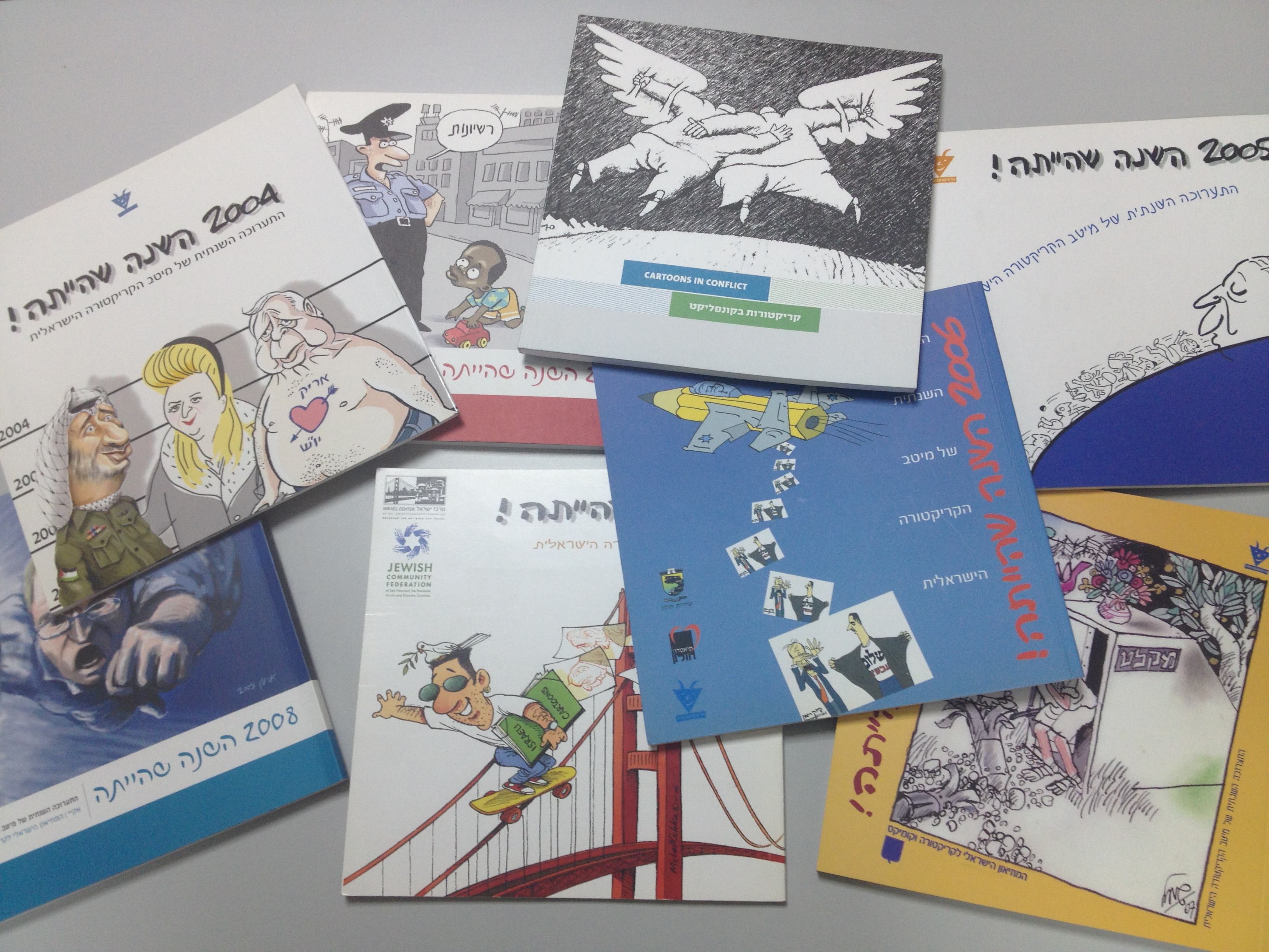 Hashana